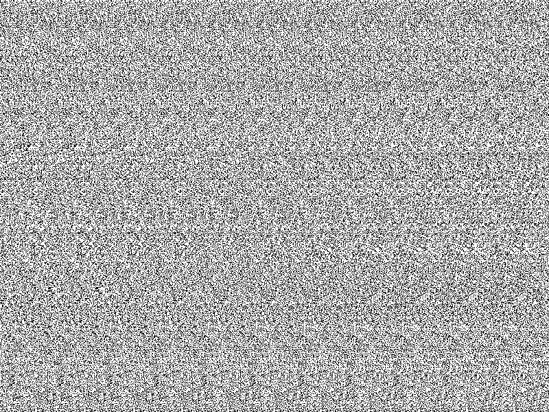 Single Image Random Dot Stereogramm. Dieses Bild wurde von Martin Hawlisch erstellt und unter der GFDL veröffentlicht.